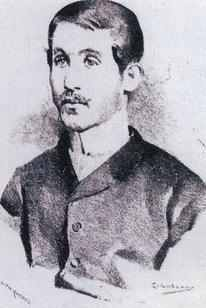 Depicted person: Cesário Verde